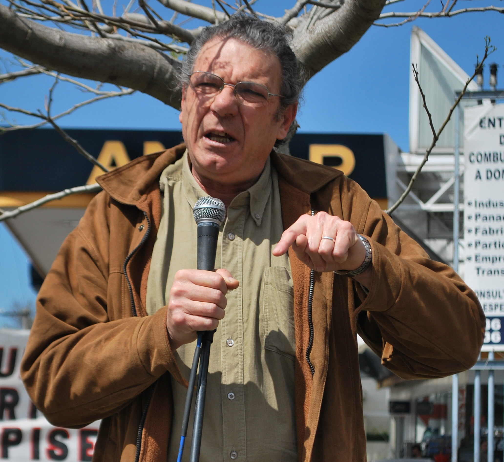 Fotografía del economista y político del Frente Amplio, Héctor Tajam, en un acto de campaña de cara a las elecciones de octubre de 2009.